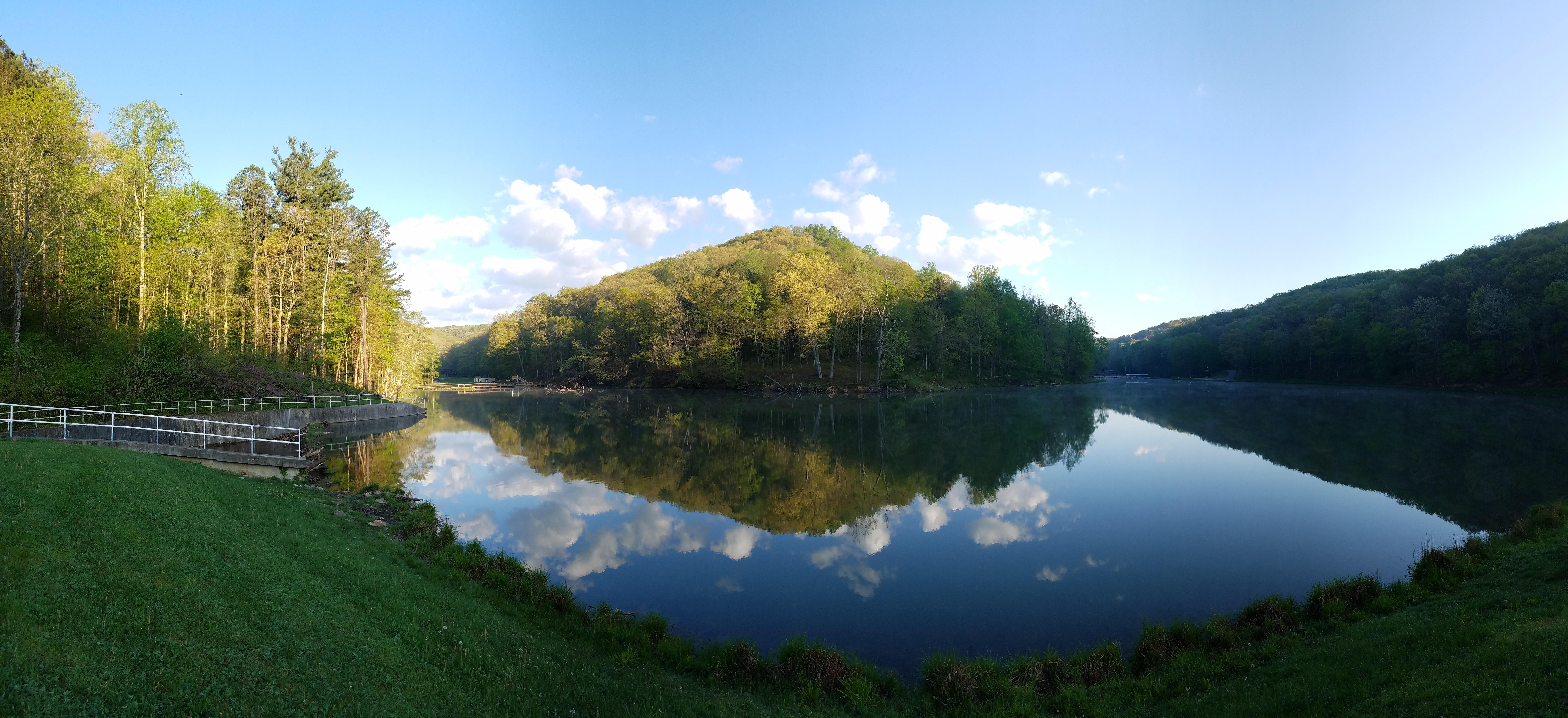 Laurelville, Ohio